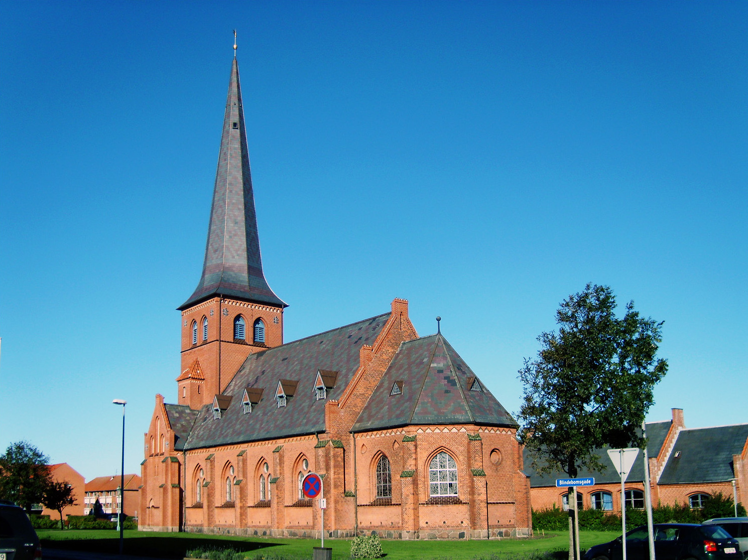 fra sydøst